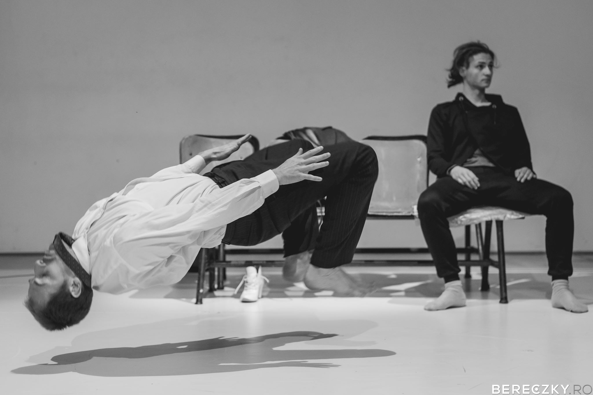 FADE OUT c. előadás